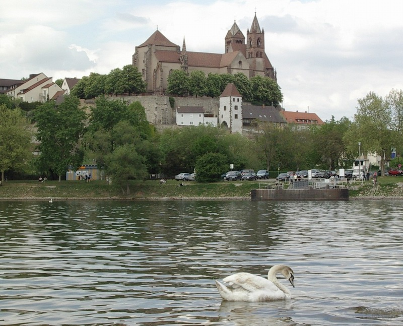 Vieux-Brisach (Allemagne) vue depuis la rive française du Rhin